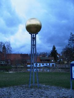 Der Startpunkt des Planetenwegs von Georgensgmünd nach Spalt.